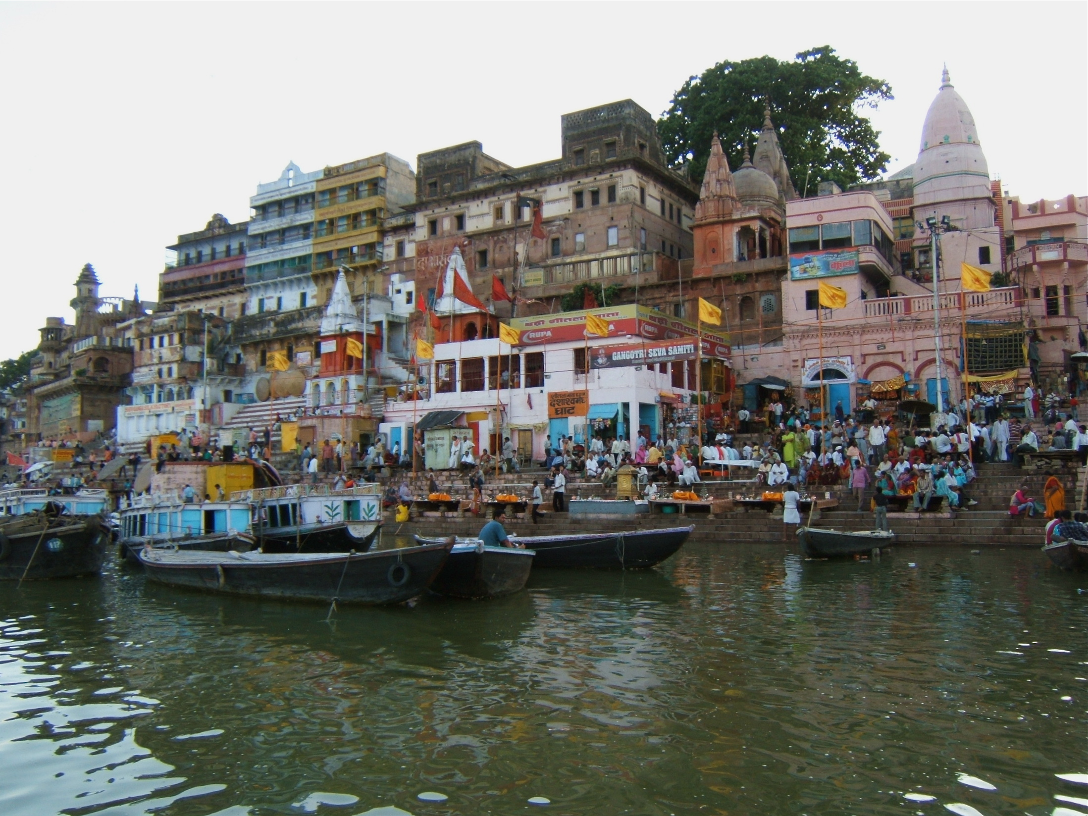 Dahsashvamedha ghat in Varanasi